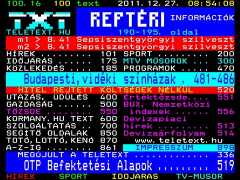 A közszolgálati csatornák teletextje